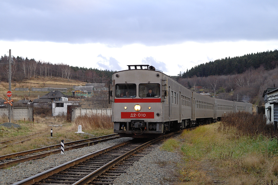 Д2 als Fernverkehrszug Korsakow - Tomari